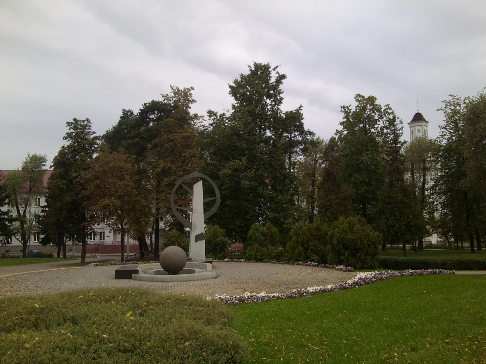 Сквер "Содружество" в Минске